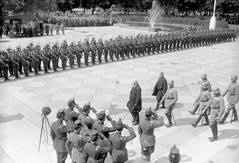 Die grosse Verfassungsfeier der Reichsregierung im Reichstag in Berlin! Reichspräsident von Hindenburg schreitet mit Reichswehrminister Groener und dem Chef der Heeresleitung von Hammerstein die Ehrenkompanie der Reichswehr nach der Feier im Reichstag auf dem Platz der Republik ab.